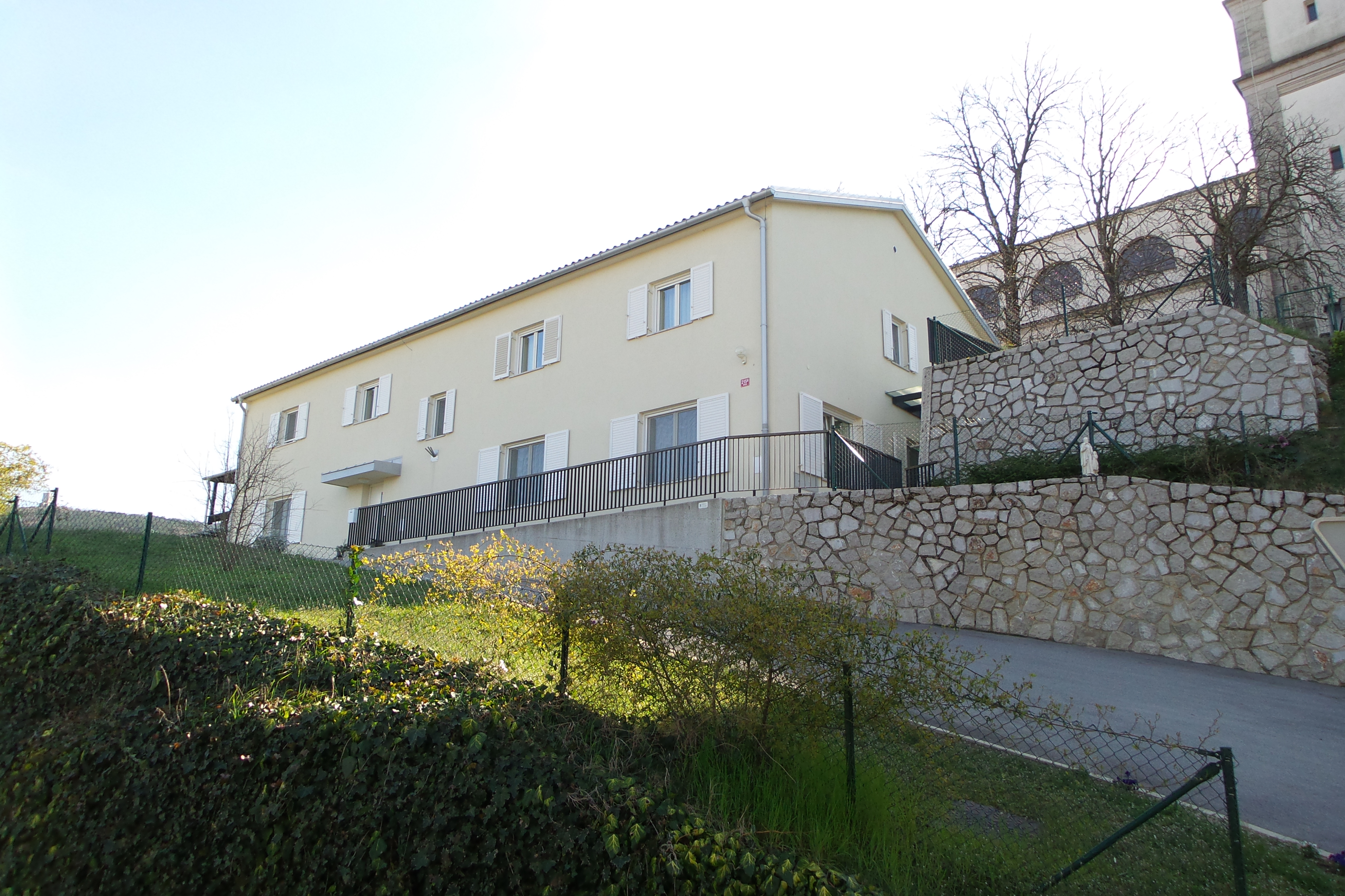 Dom sester usmiljenk